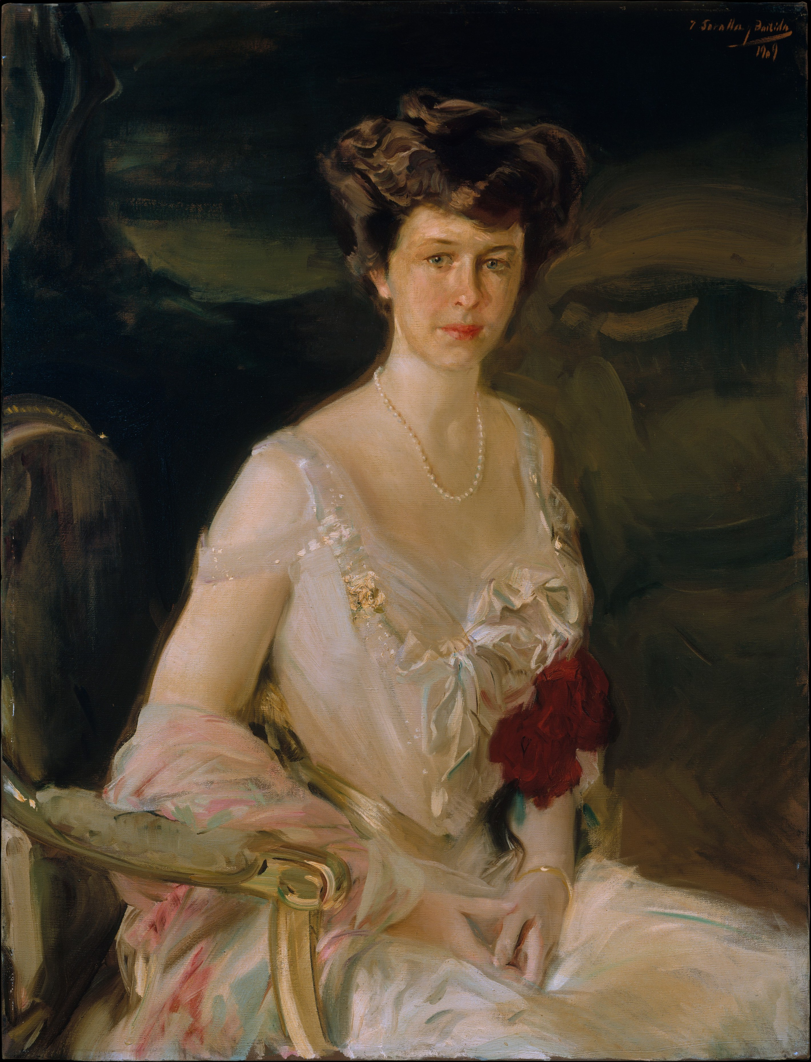 Painting; Paintings